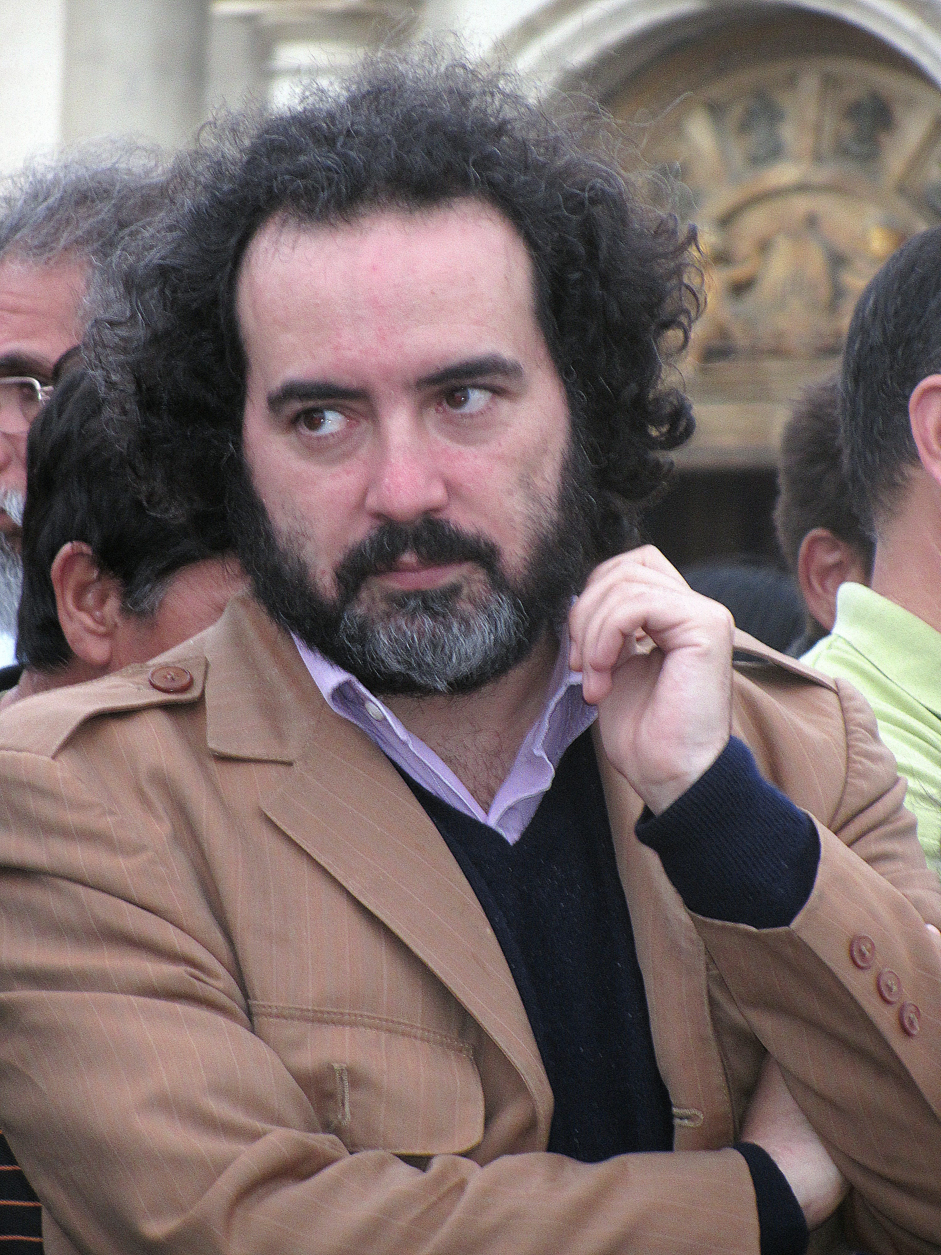 El escritor chileno Rafael Gumucio en la Fiesta del Libro de la Plaza de Armas de Santiago, 23 de abril de 2013